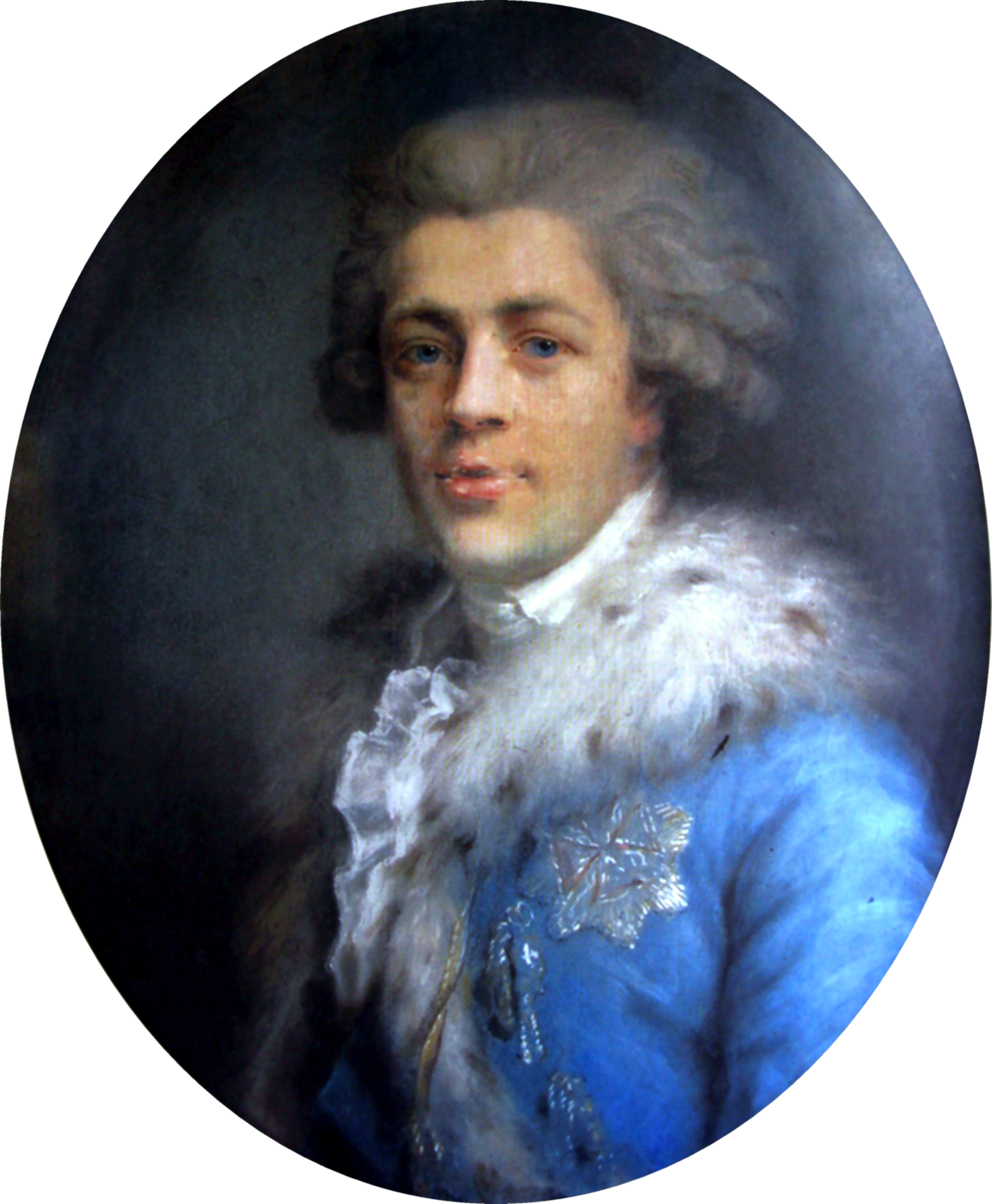 Portrait of Ignacy Potocki (1750-1809)